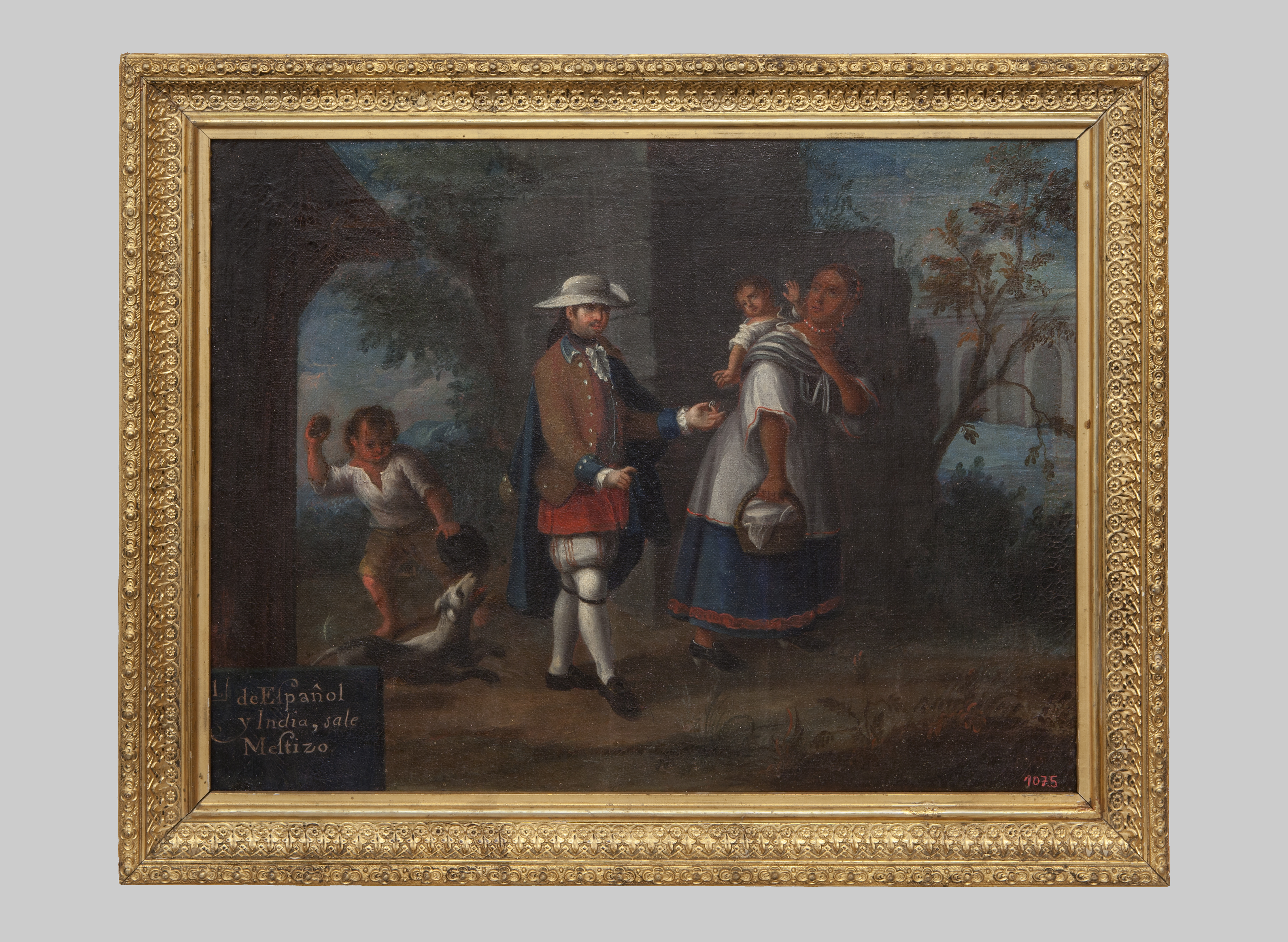 "1 De Español y India sale Mestizo". pintura sobre tela. Biblioteca Museu Víctor Balaguer